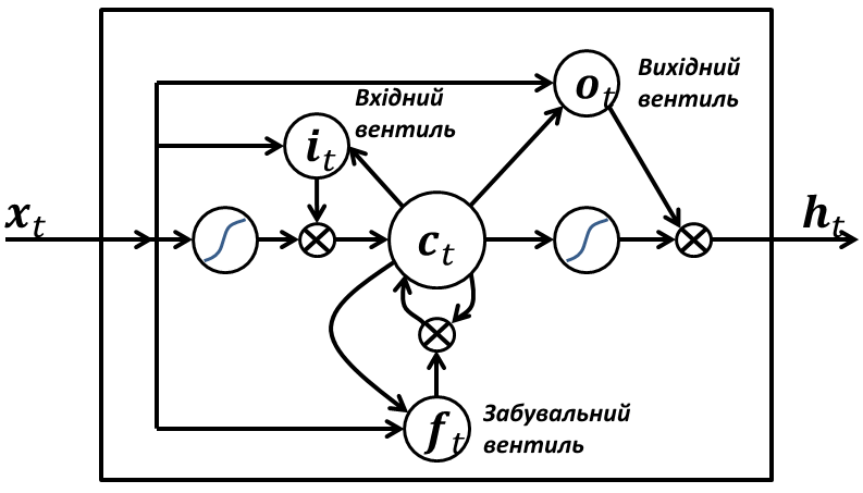 Вузли довгої короткочасної пам'яті